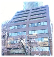 ニュー西新橋ビル 日本海隆本社